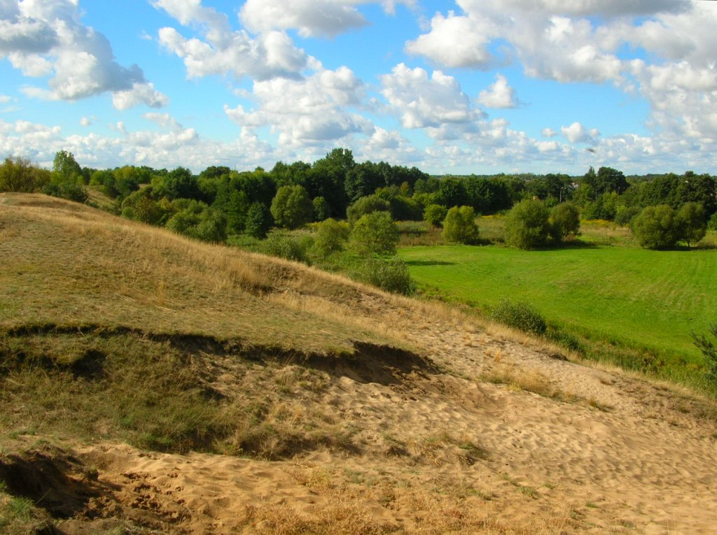 Terasy doliny Brdy na Jachcicach w Bydgoszczy